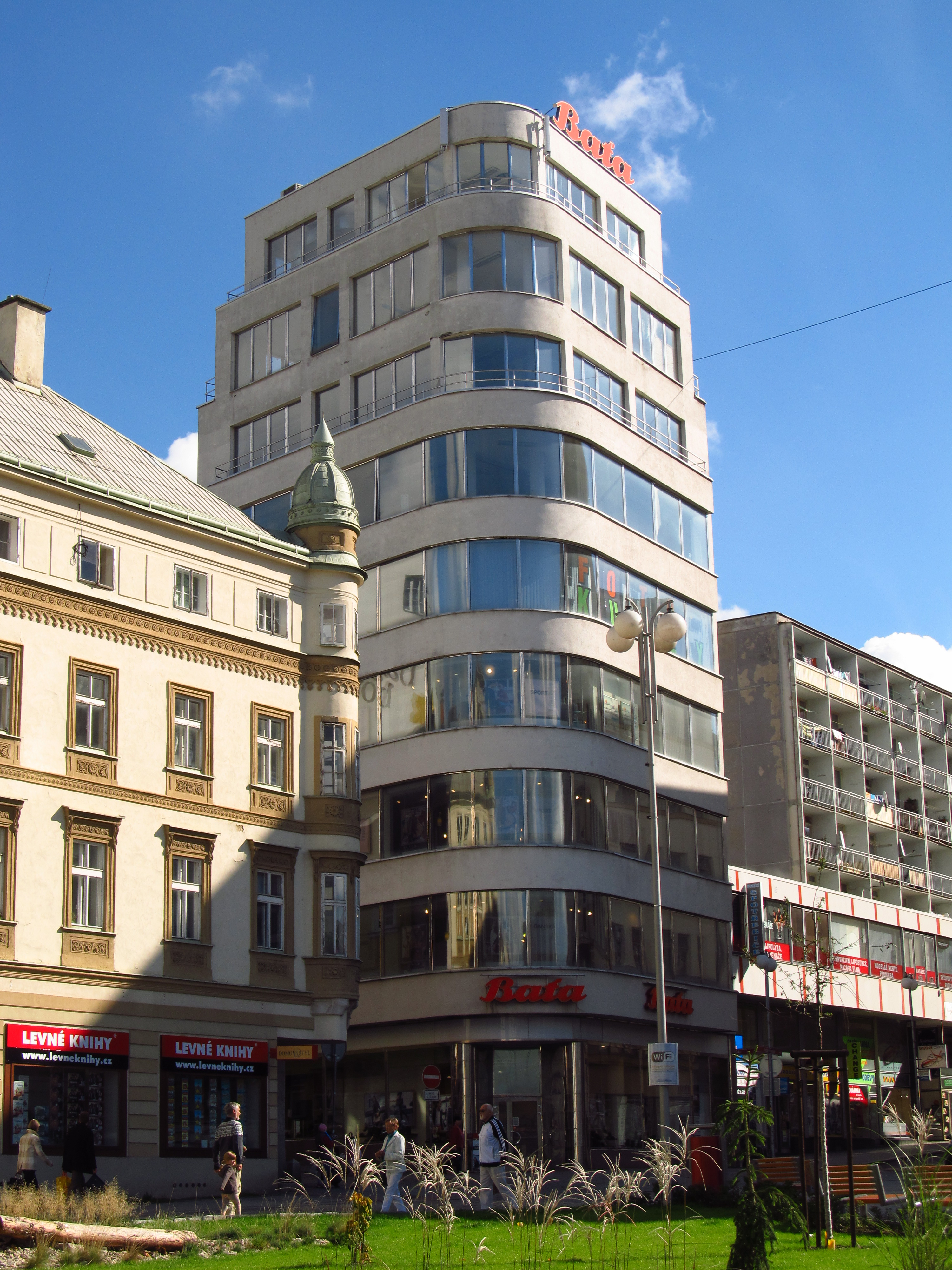 Obchodní dům (Liberec), Soukenné nám. 23, Liberec